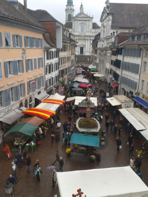 Market in Solothurn, Switzerland